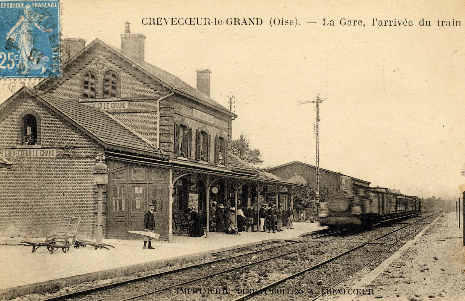 Carte poostale ancienne éditée par Debray-BollezCrèvecœur-le-Grand La Gare